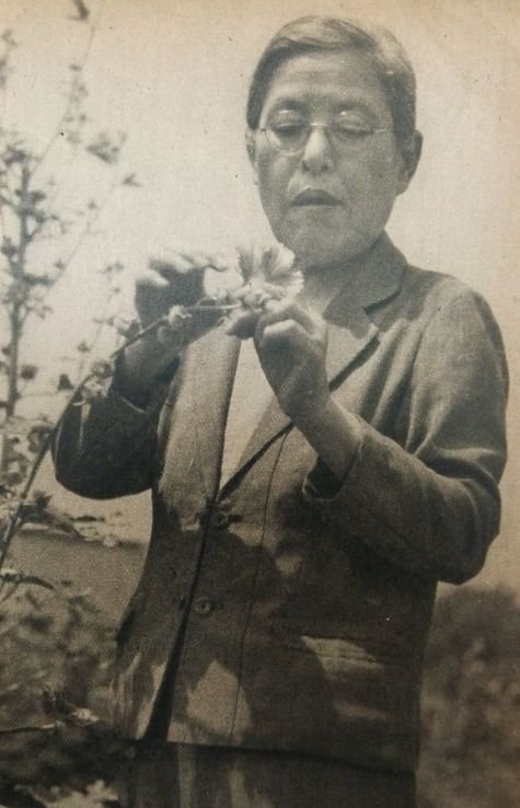 保井コノ